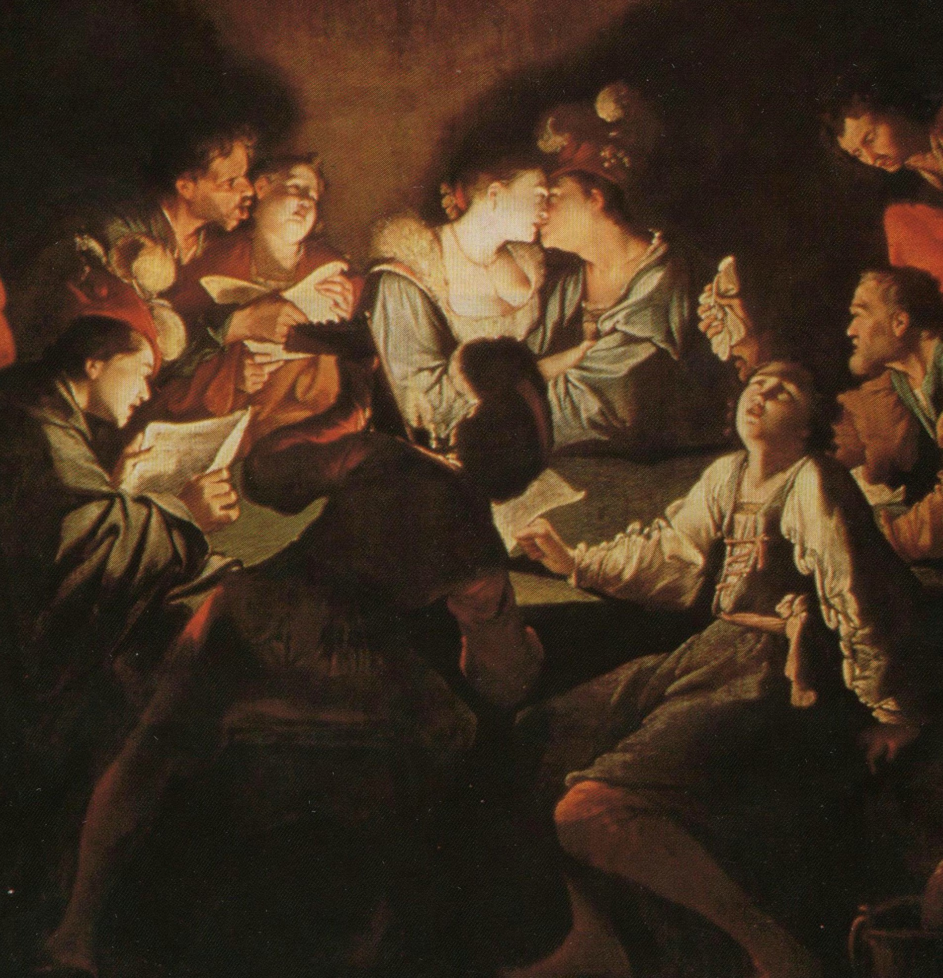 Le concert